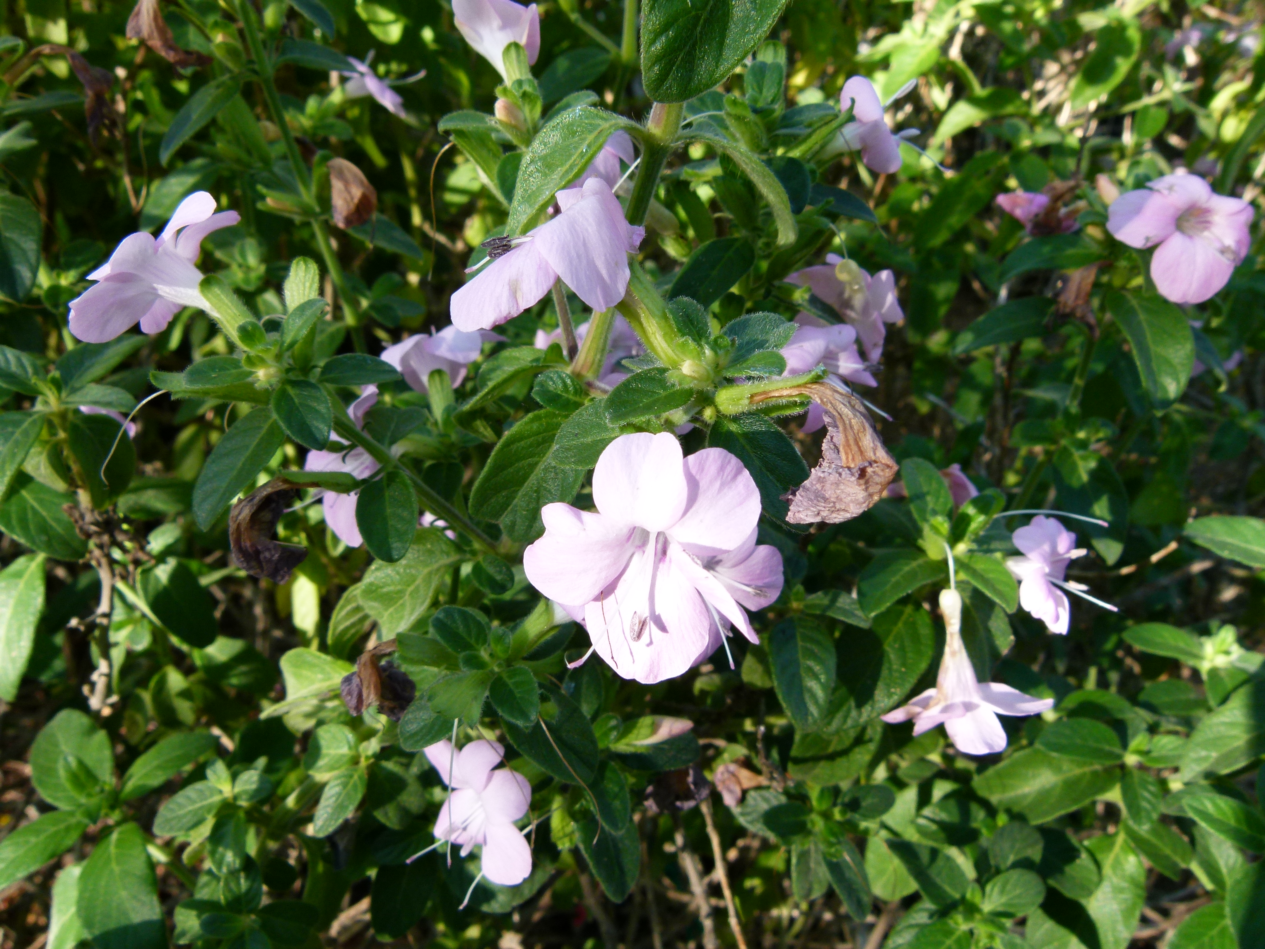 Jardin botanique Montjuic, Barcelone